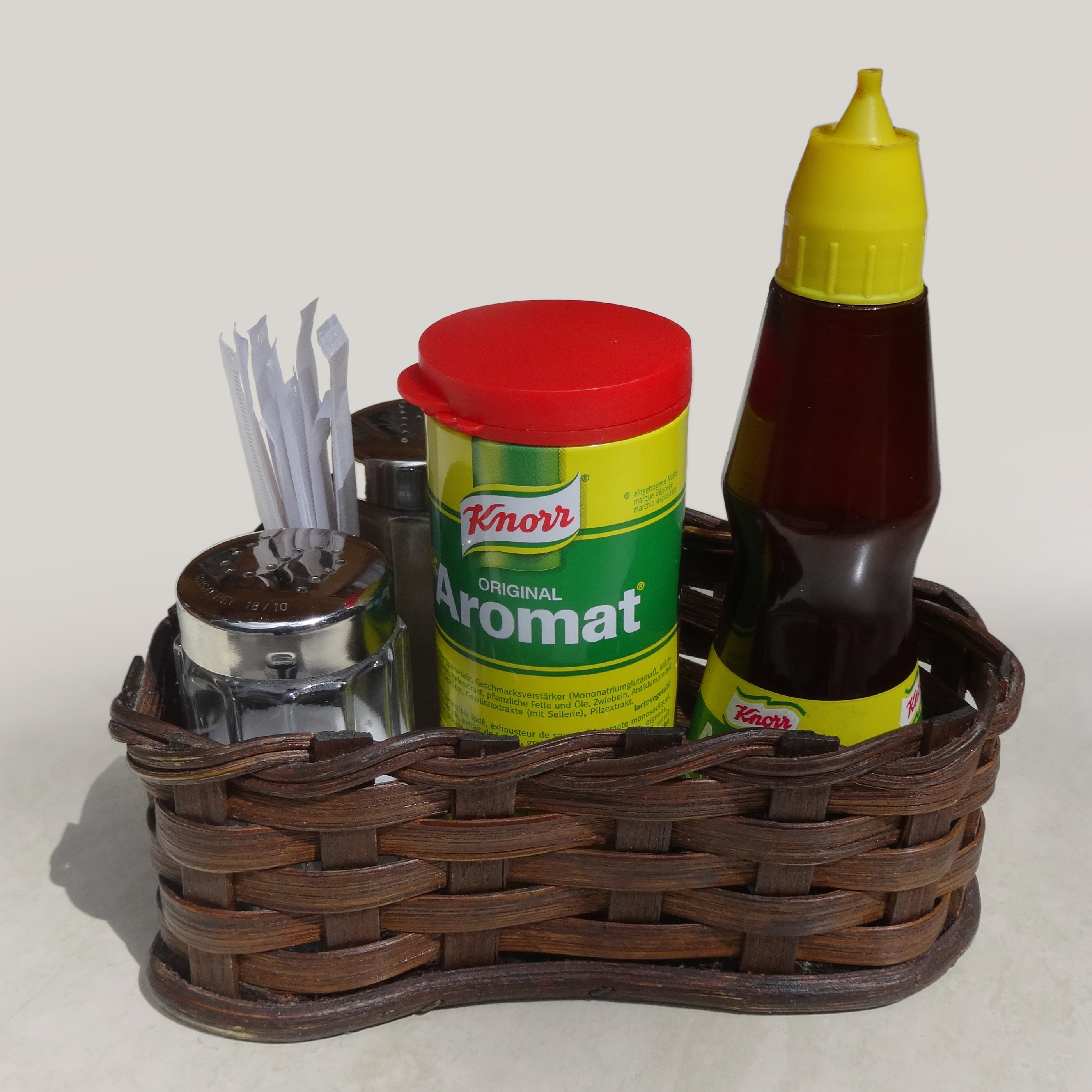 Plattmenage, Schweiz